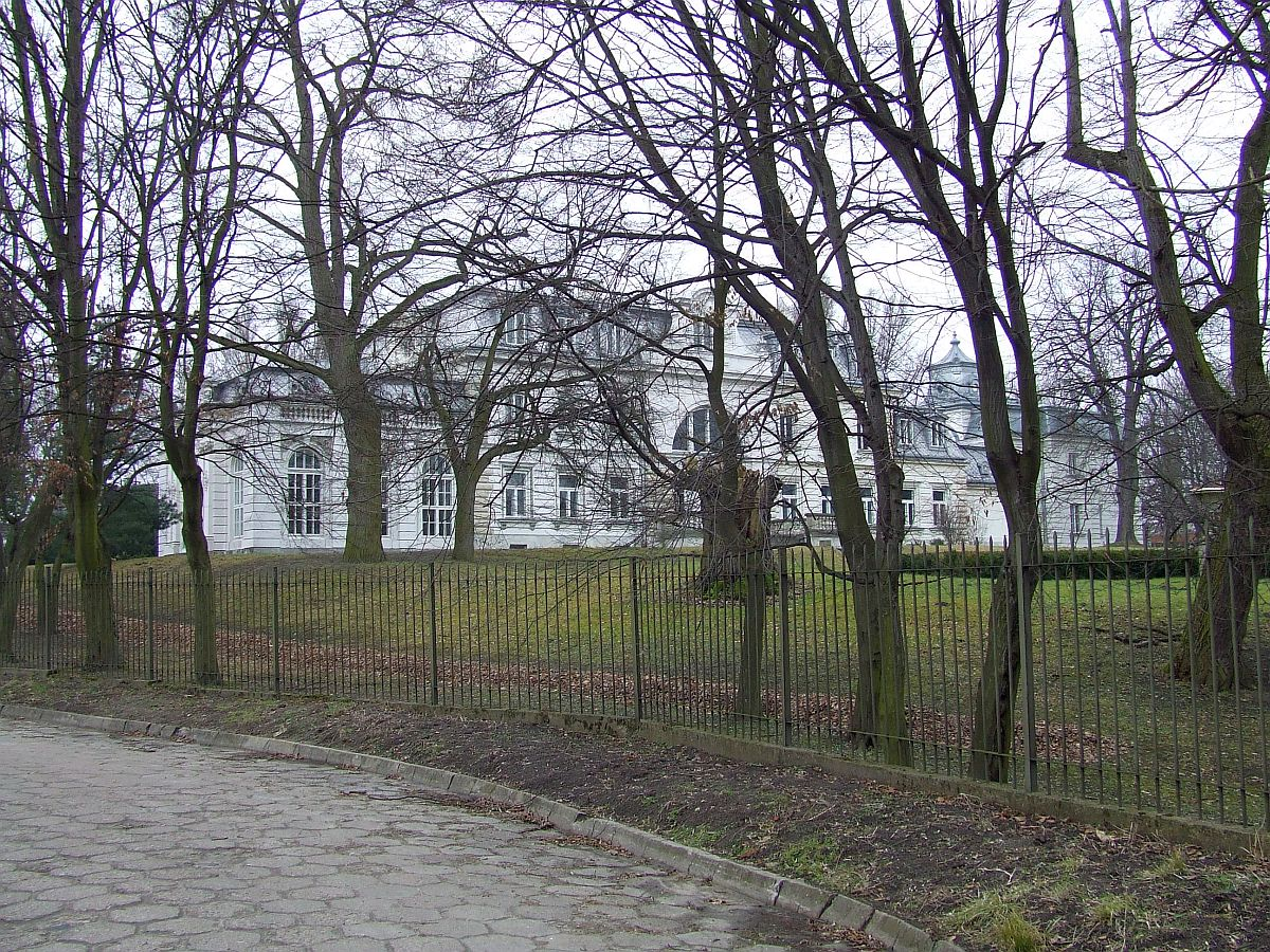 Zaborów (powiat warszawski zachodni), palace